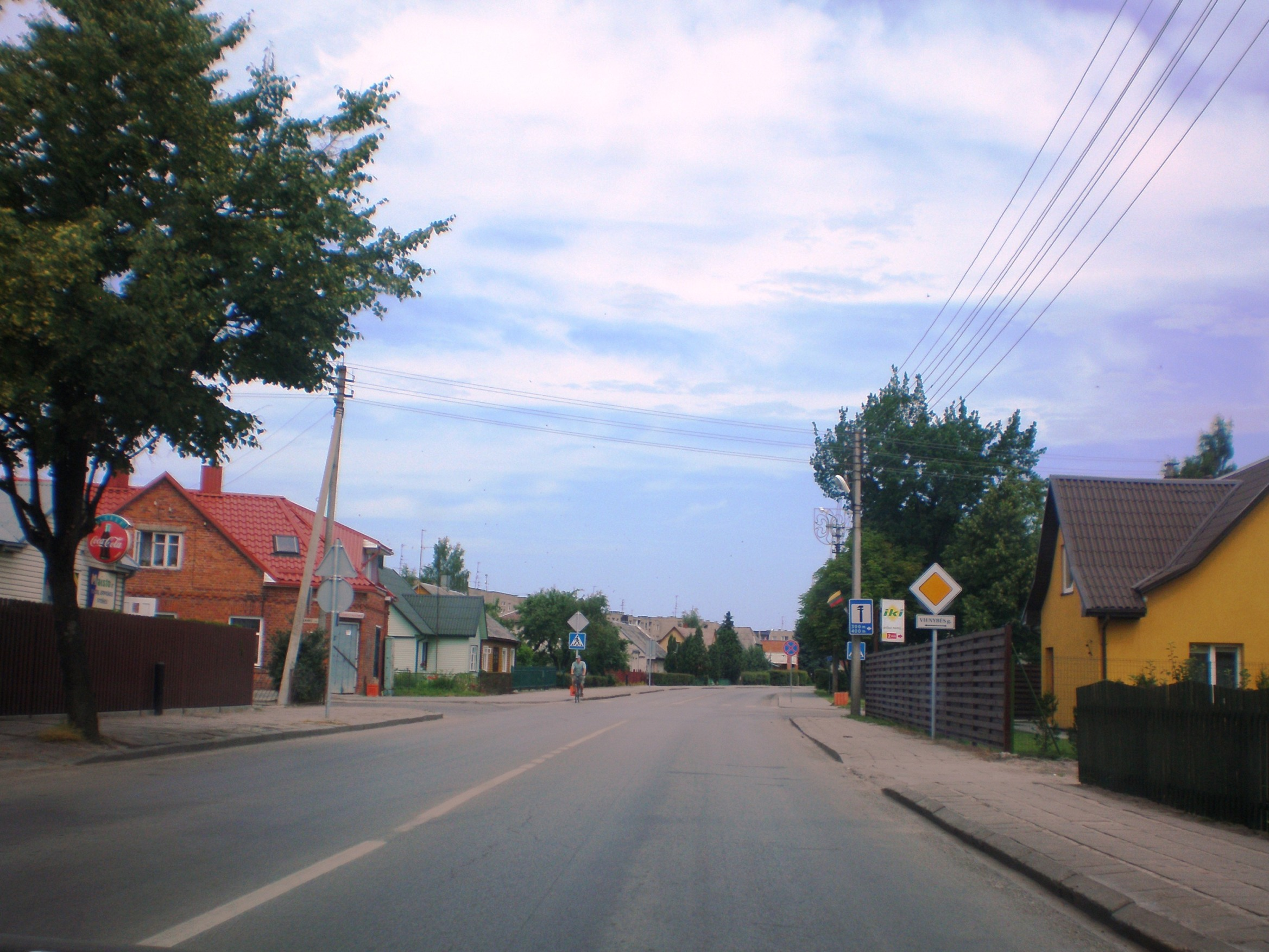 Vilkaviškis, S. Neries gatvė